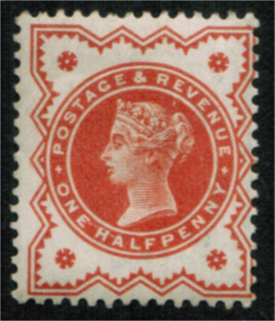 Victoria, UK Briefmarke 1887, Mi.-Nummer 86, 1/2 p.